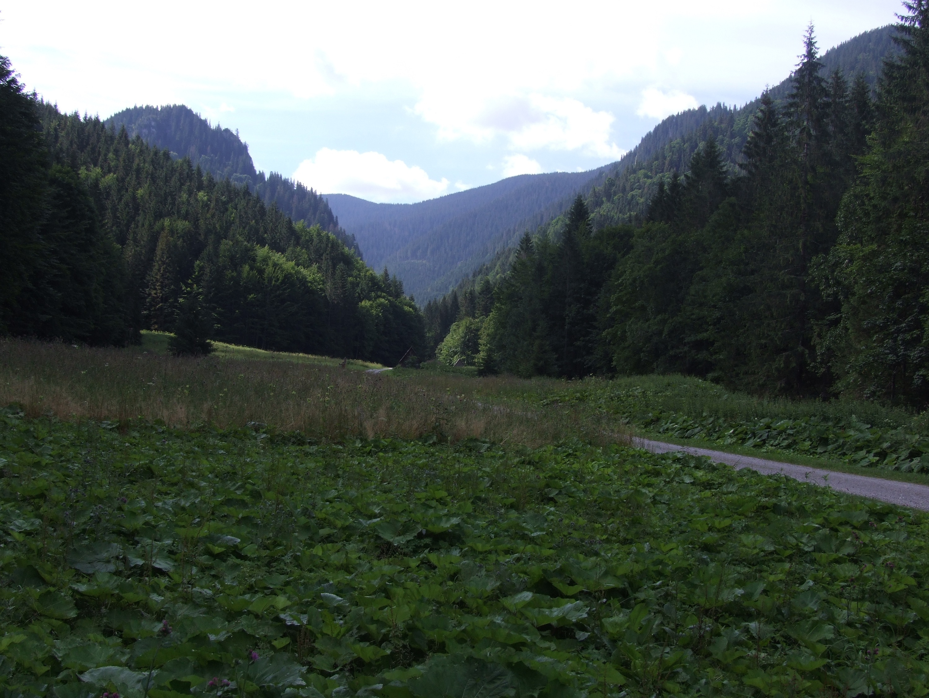 Dolina Bobrowiecka Orawska, dolna część powyżej Waniczki